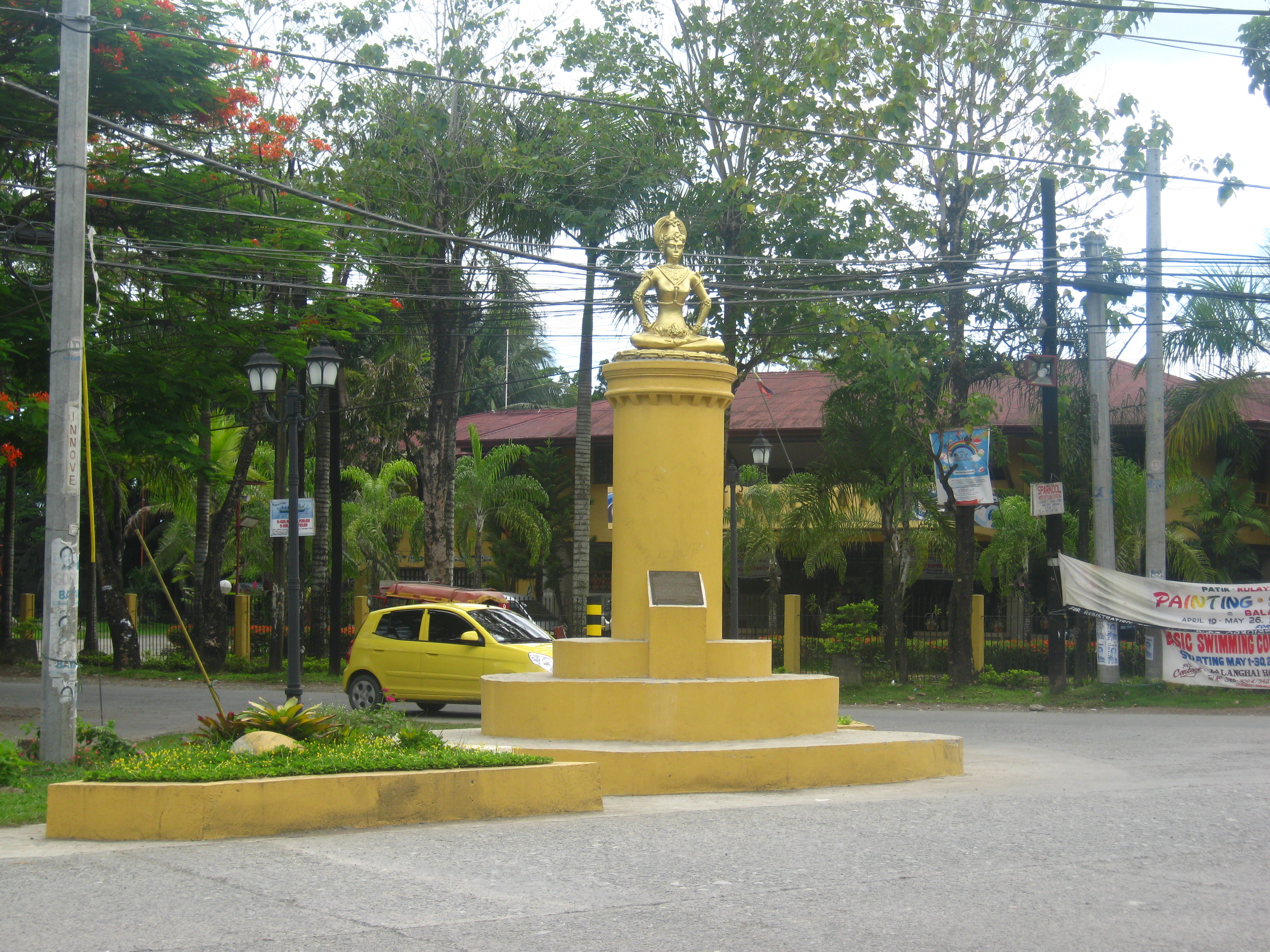 Golden Tara